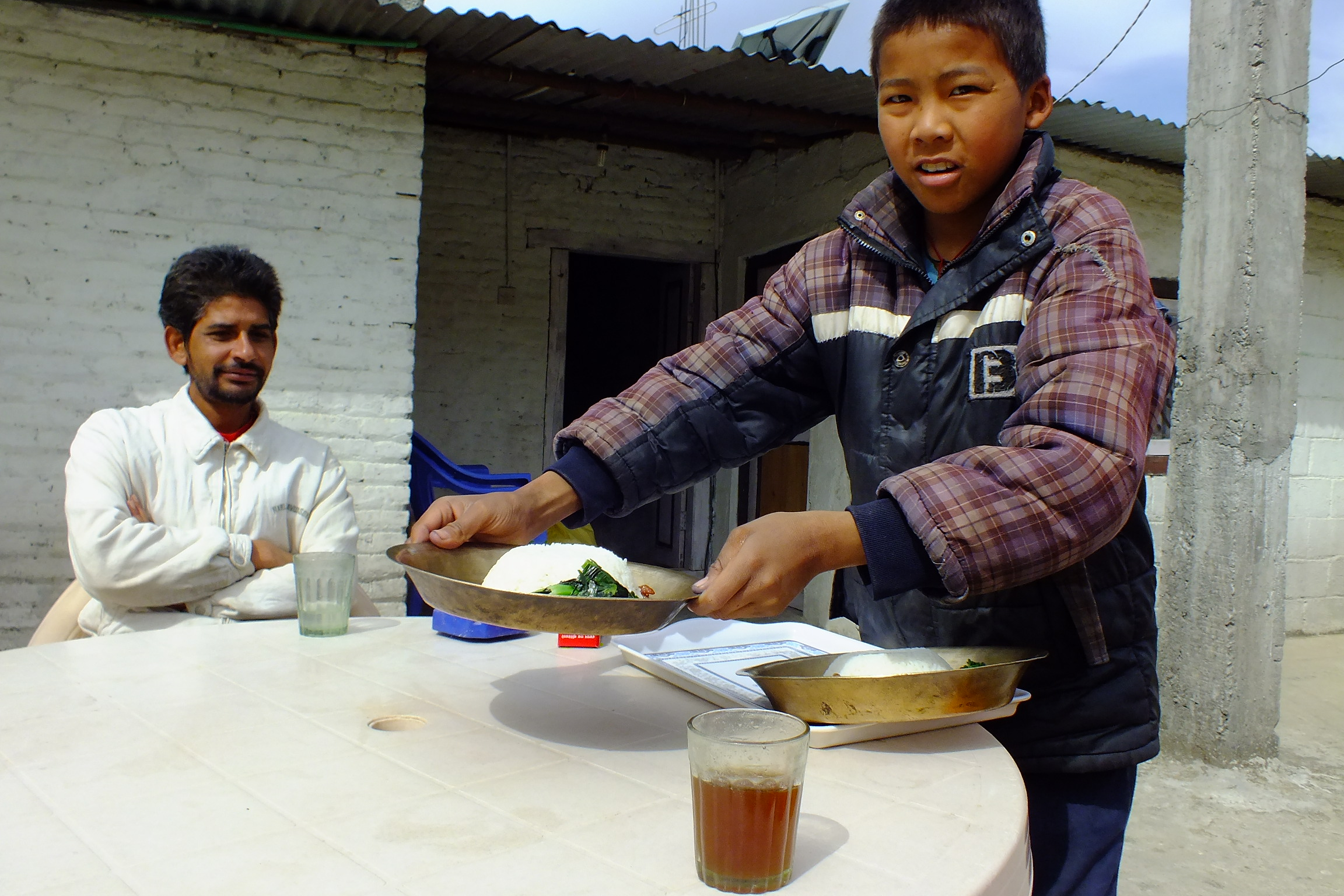 Nagarkot Dal Bhat Tarkari